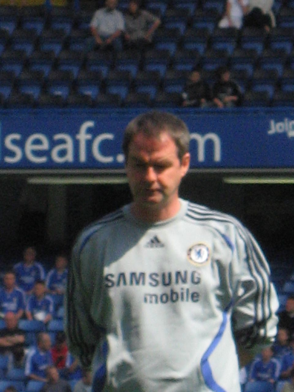 Steve Clarke